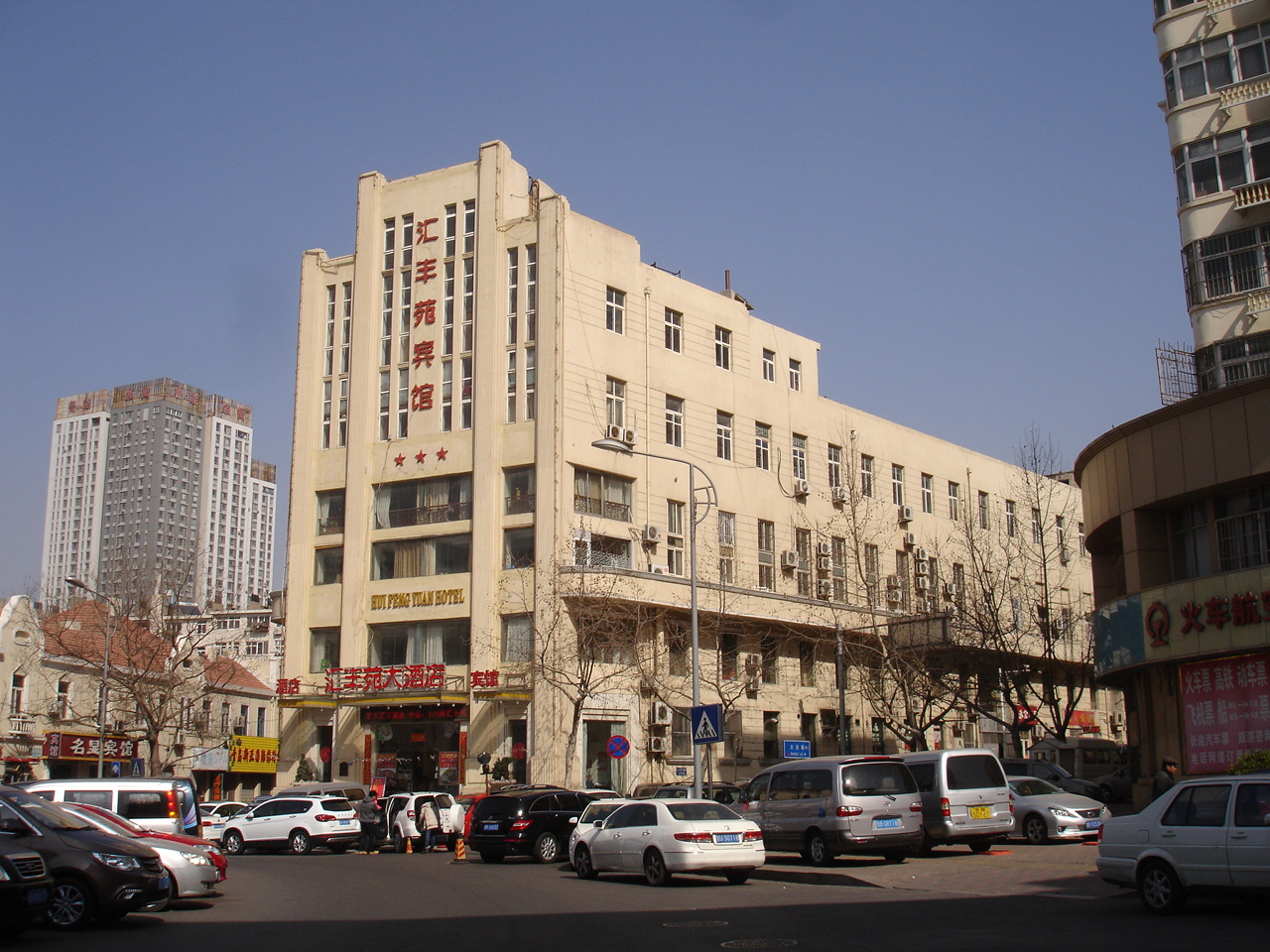 青岛市物品证券交易所旧址